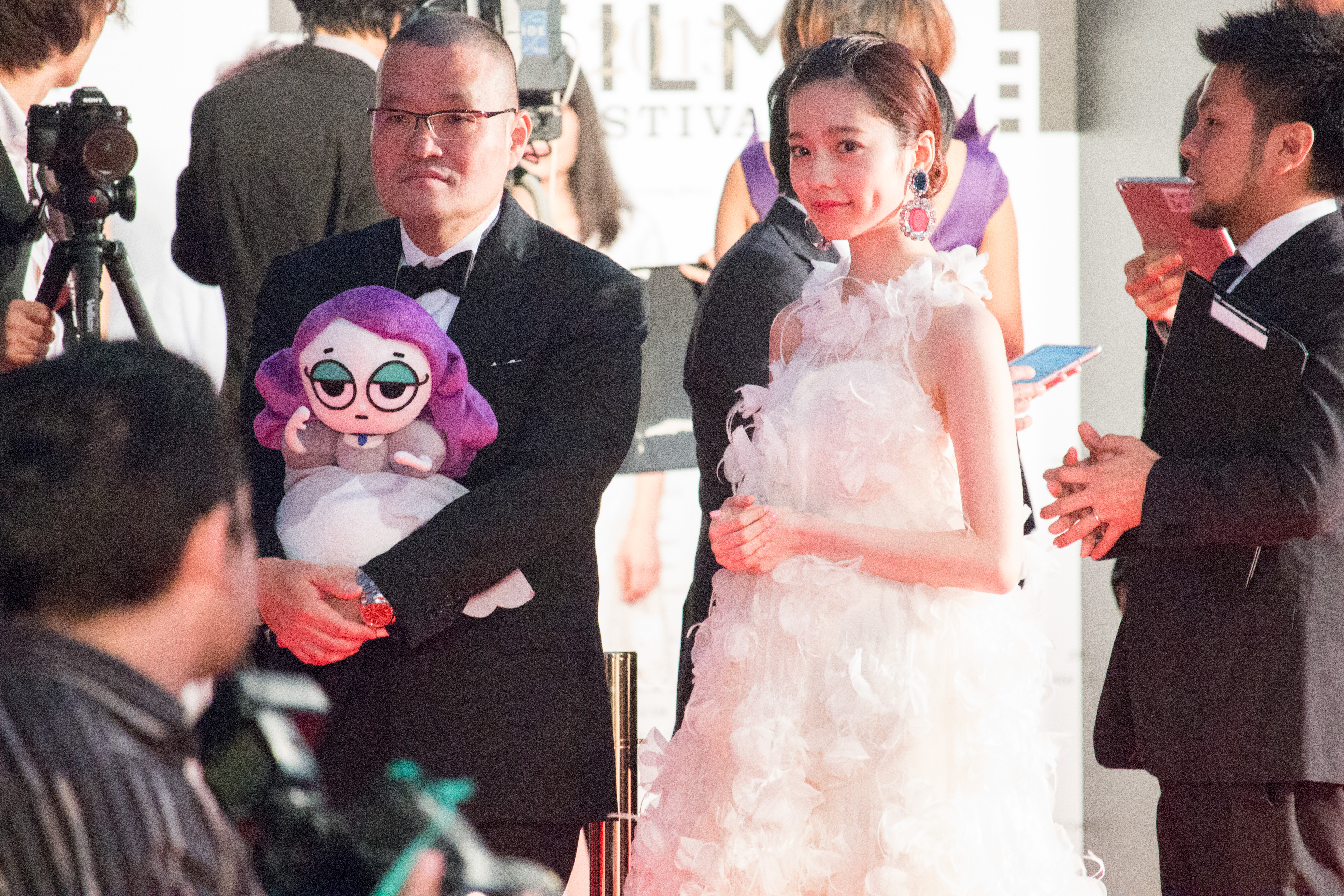 第28回 東京国際映画祭 オープニングセレモニー 島崎遥香 中田秀夫 (劇場霊)